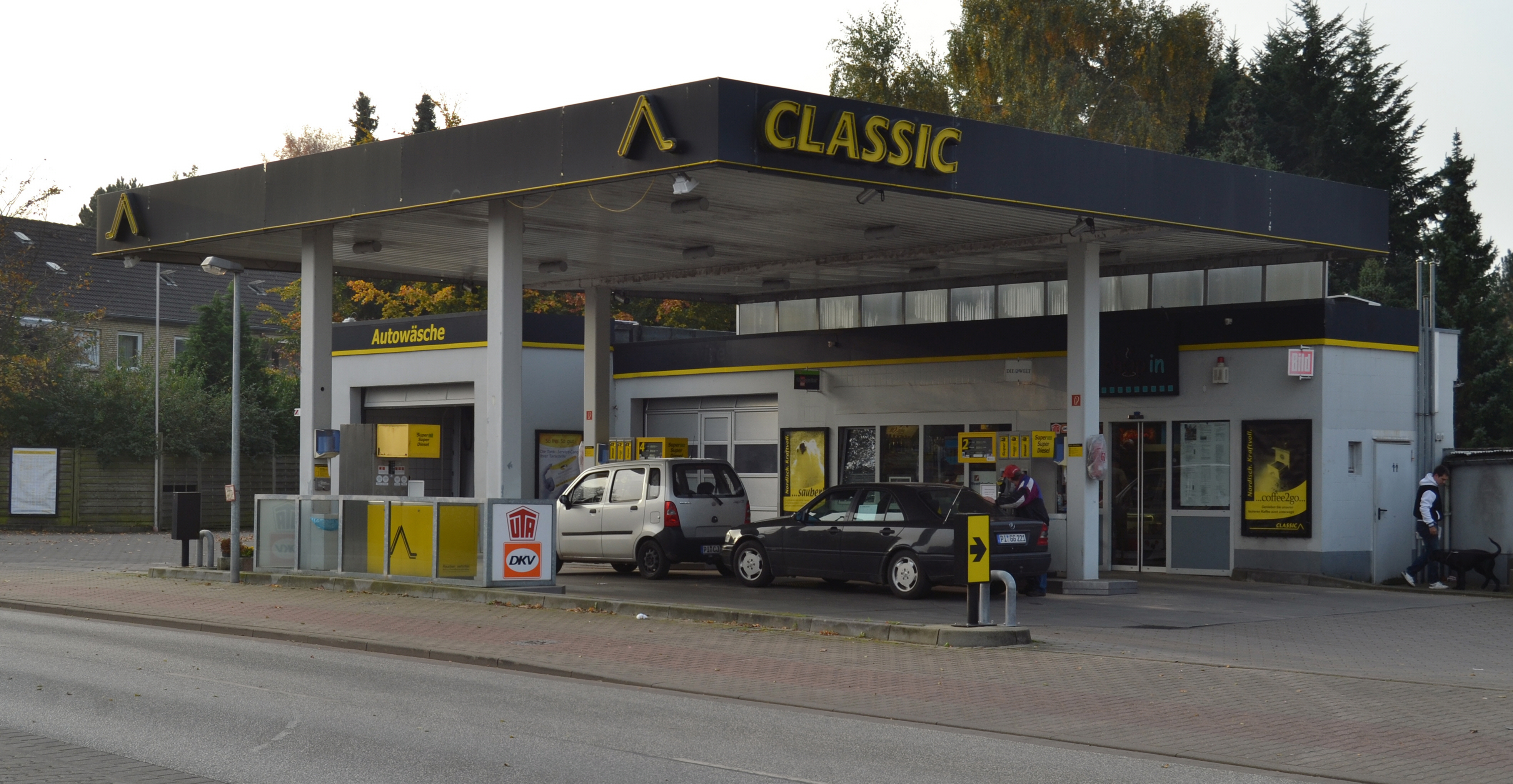 Die Classic Tankstelle in Uetersen, Abriss im Januar 2013.